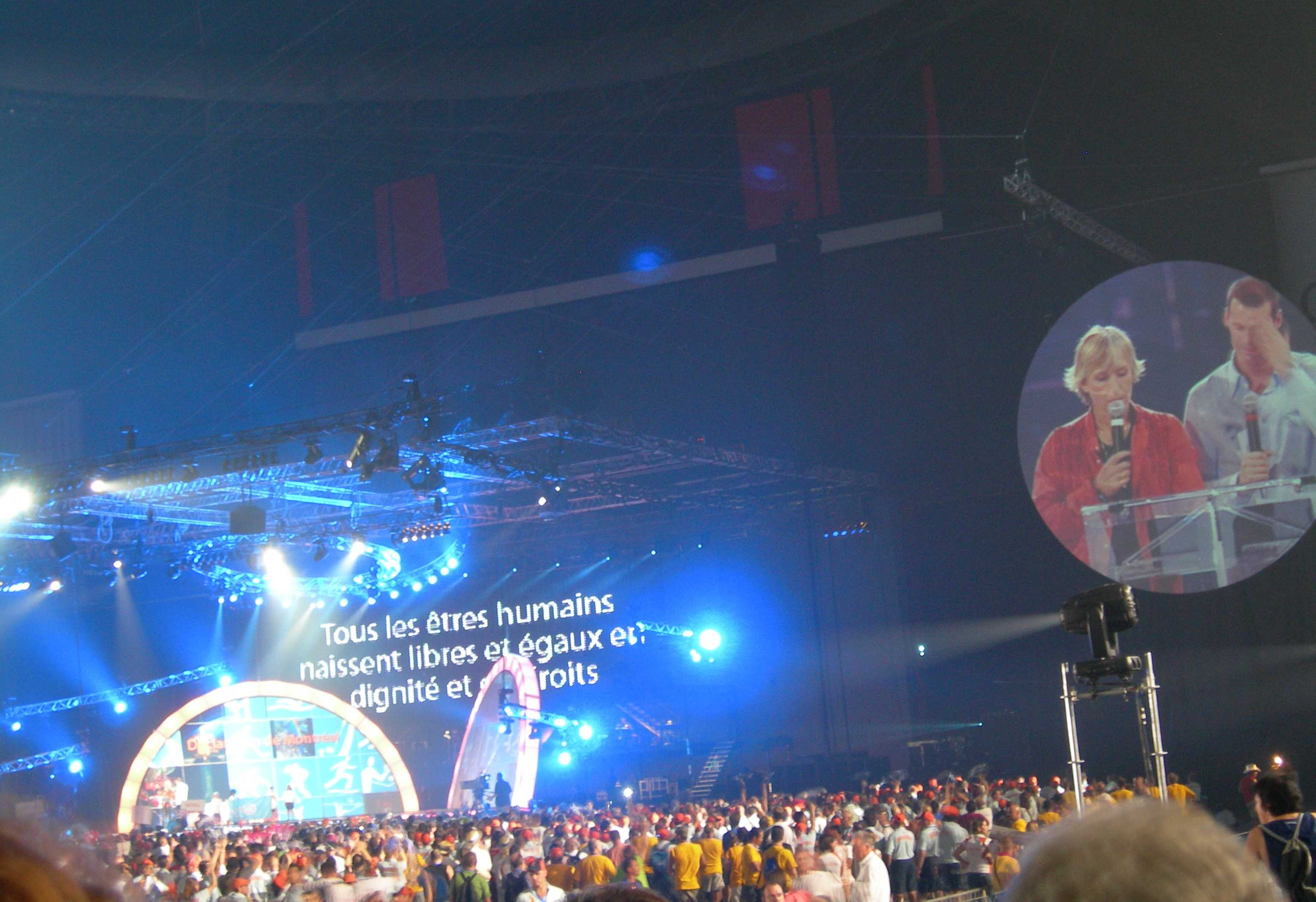 Martina Navratilova et Mark Tewksbury lisent la Déclaration de Montréal lors de l'ouverture des Outgames Auteur : Utilisateur:Atilin Distribution libre